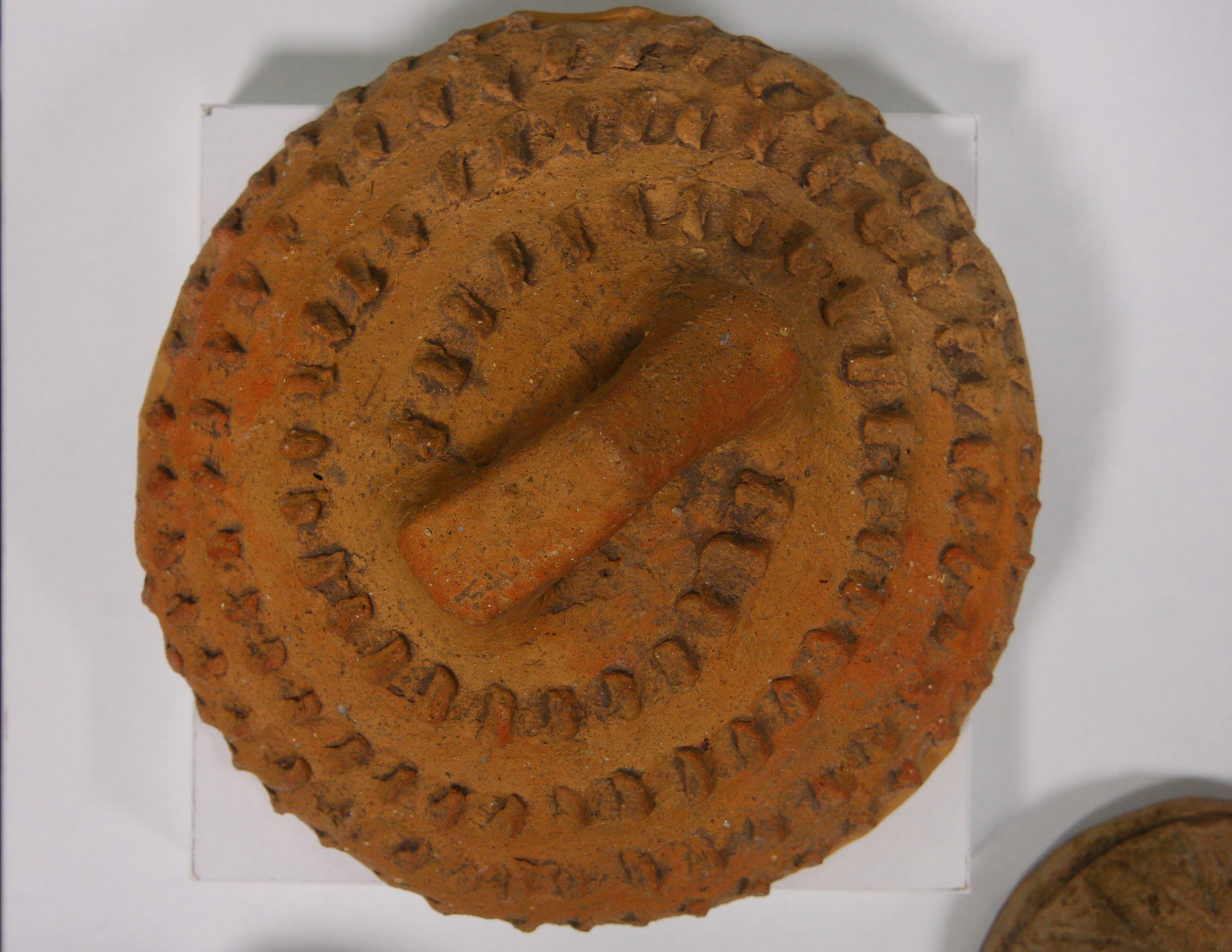 Gumelnita Culture Art